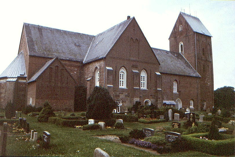 Föhr, Nieblum Johanneskirke i Sydslesvig. Johannes kirken, Föhr